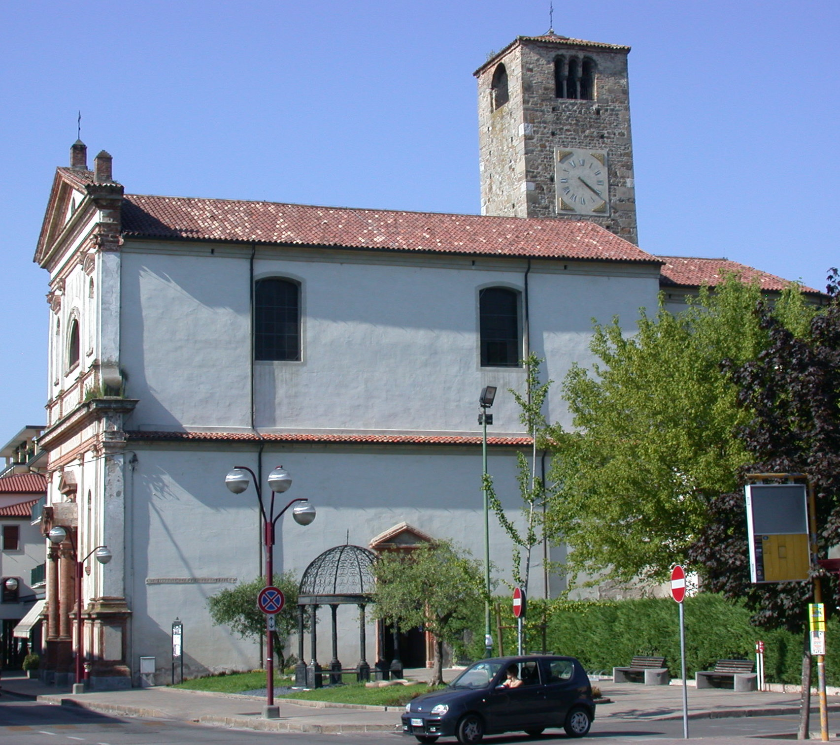 L'oratoria della Madonna Nera di Montegrotto Terme